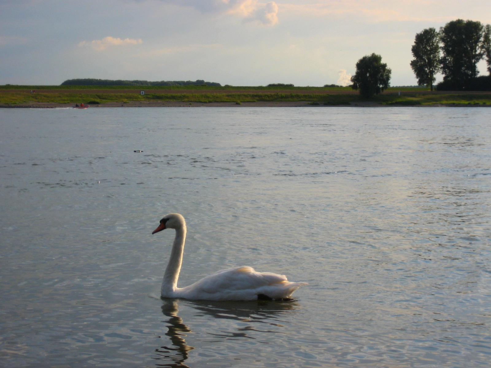 Ein Schwan in Hitdorf im Rhein.